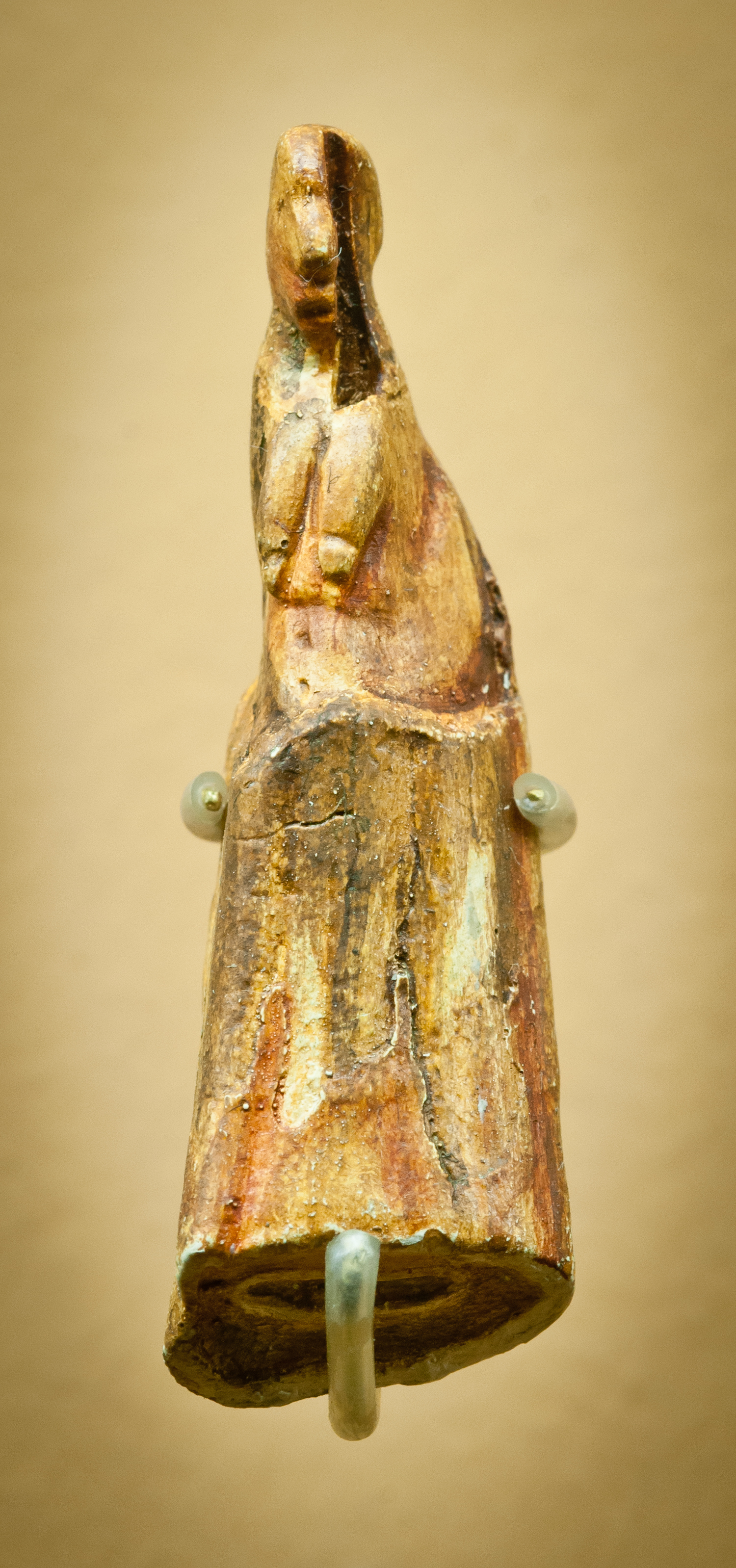 Figurine féminine sculptée dans la racine de l'incisive d'un cheval du Magdalénien (vers 14.000-13.000 avant J.-C.) Collections du Musée d'Archéologie Nationale MAN 47038